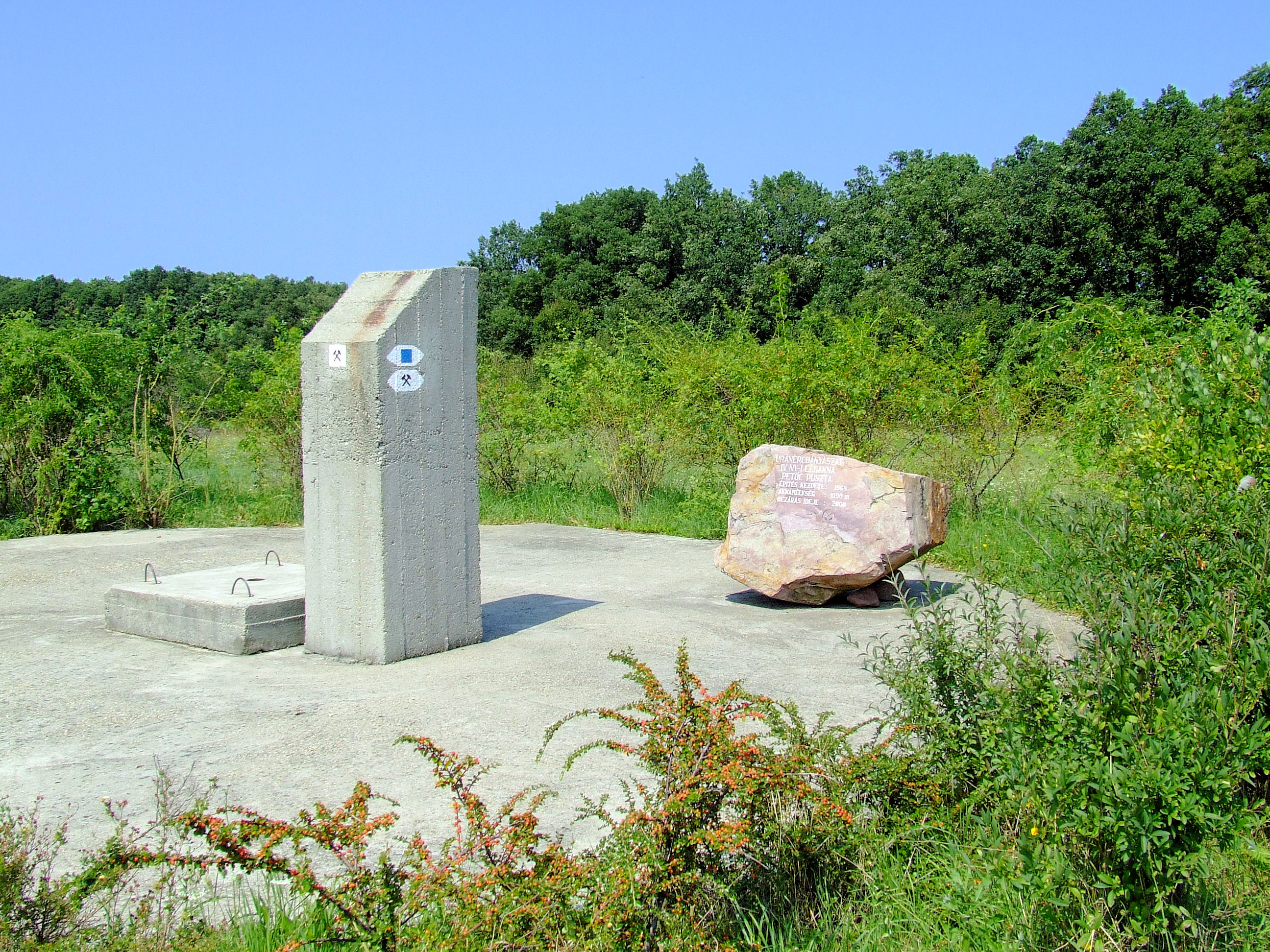 Emlékkő a mecseki uránbánya petőczpusztai légaknájánál. Az 1964-ben épített 1090 m mély légaknát 2000-ben zárták le